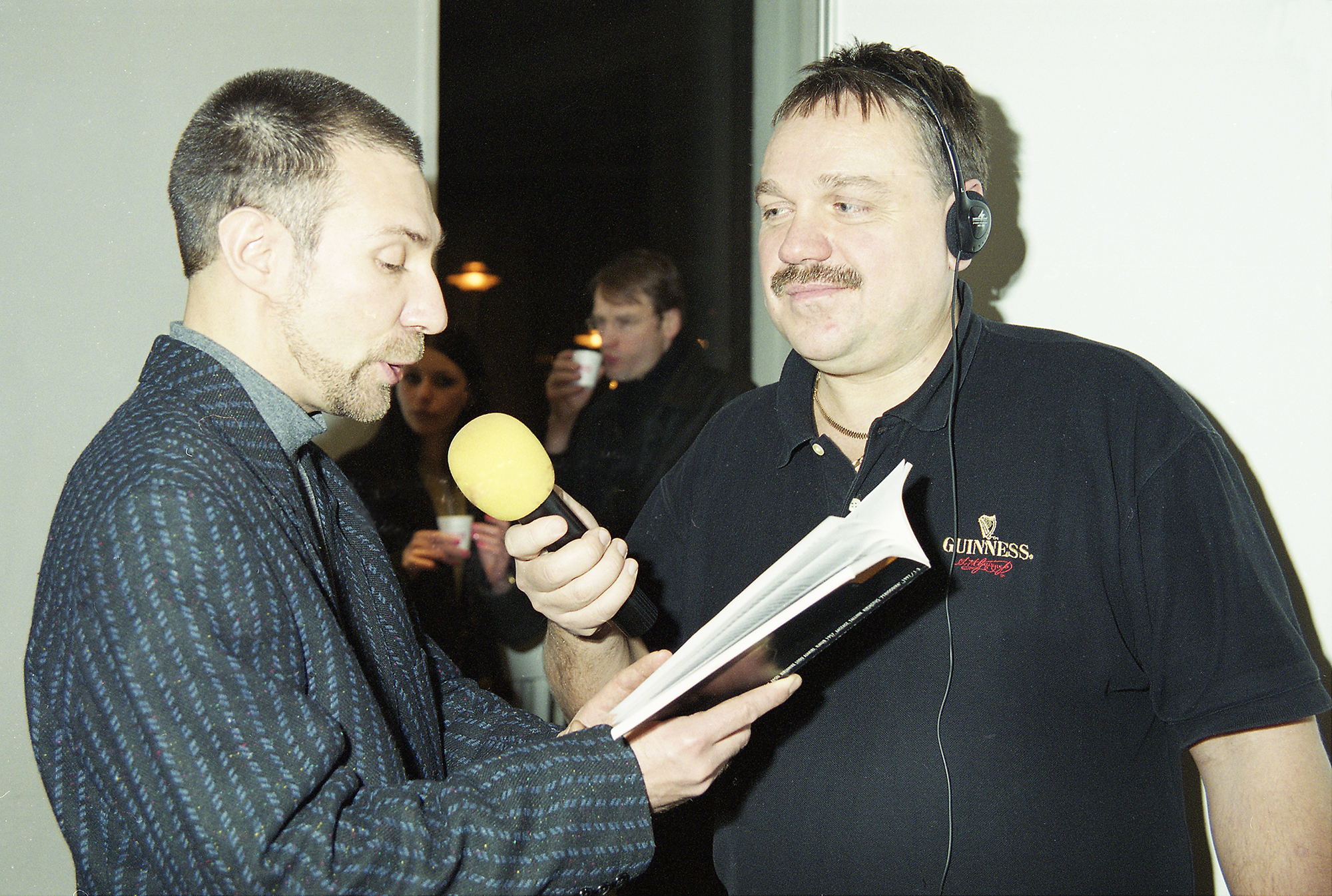 Aimar Kristerson ja Allan Roosileht Tallinna Kunstihoones 99